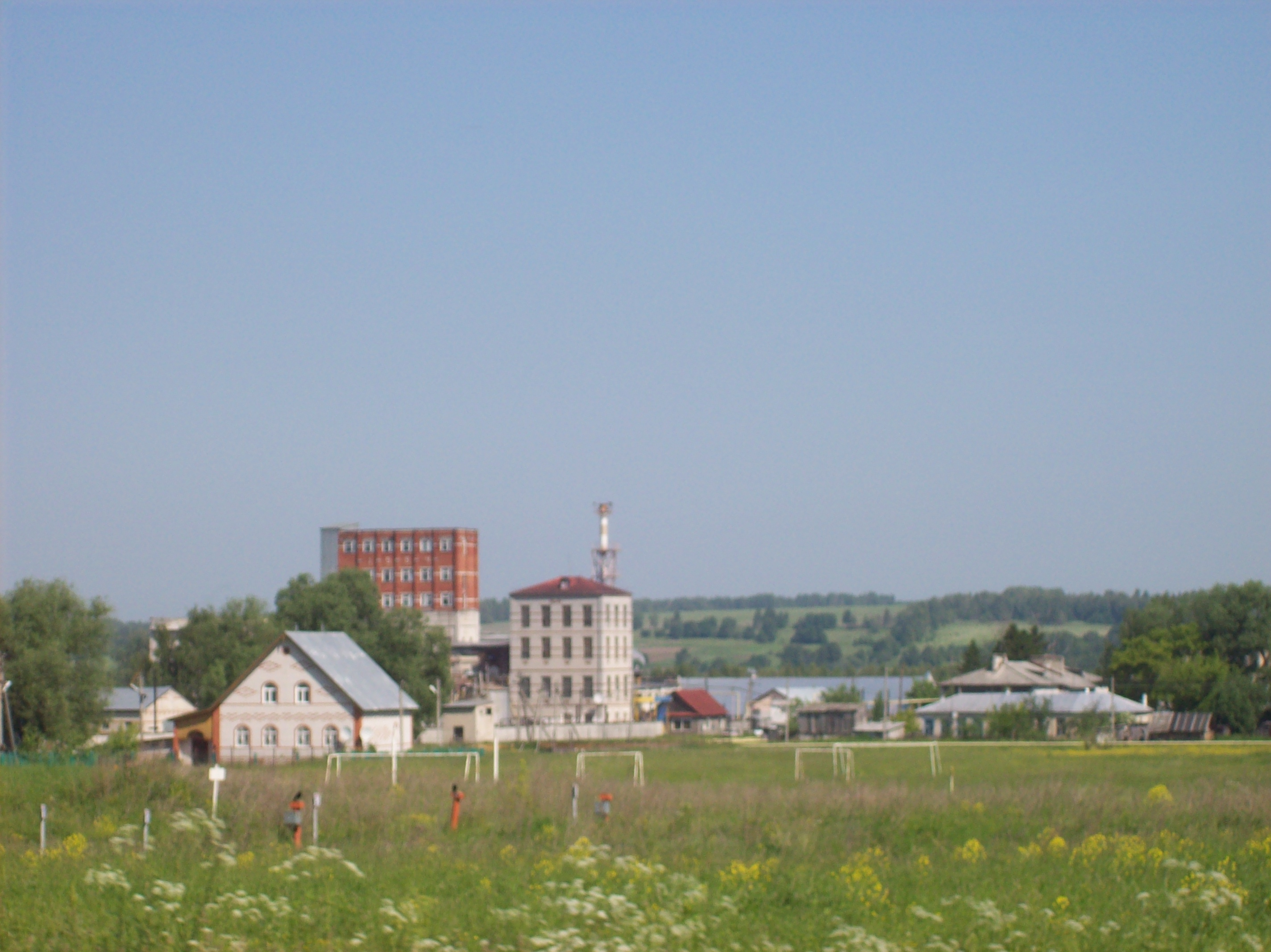 Village Chuguny Село Чугуны Нижегородской области